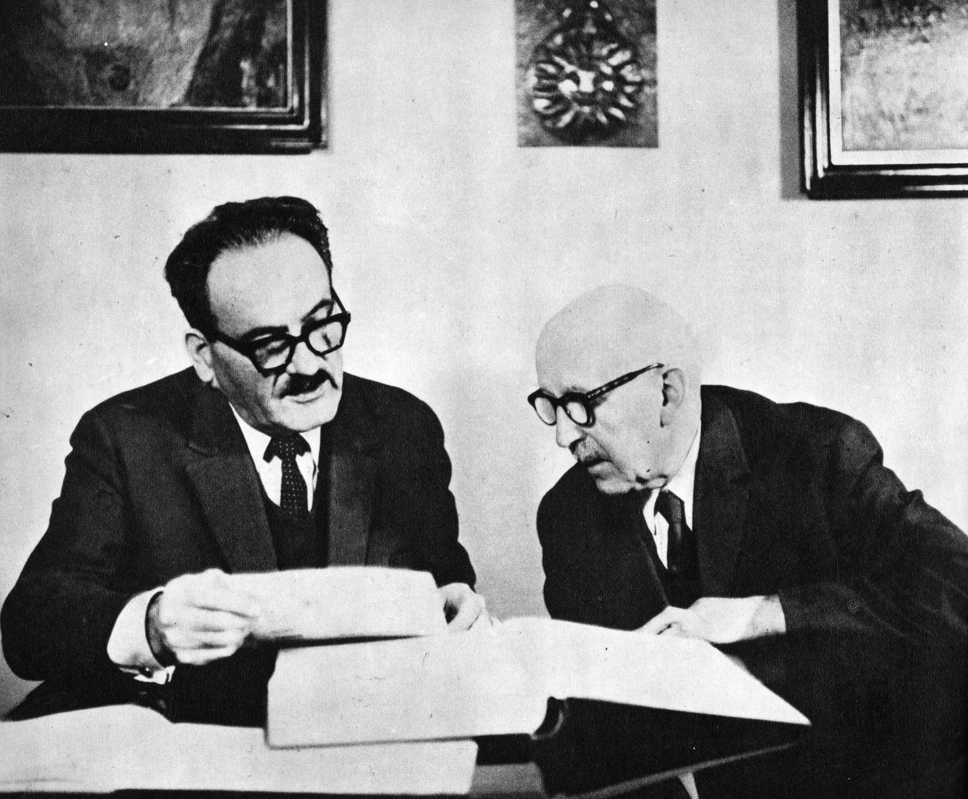 Doc. dr Józef Sałabun, dyrektor Planetarium Śląskiego (z lewej) i prof. Eugeniusz Rybka (z prawej). Jest to zdjęcie zeskanowane z albumu Gwiazdy nad nami, Rzecz o Śląskim Planetarium, Wydawnictwo Artystyczno-Graficzne, Katowice - album wydany przez Planetarium i Obserwatorium Astronomiczne im. Mikołaja Kopernika w Chorzowie w pięćsetną rocznicę urodzin Mikołaja Kopernika (1973)